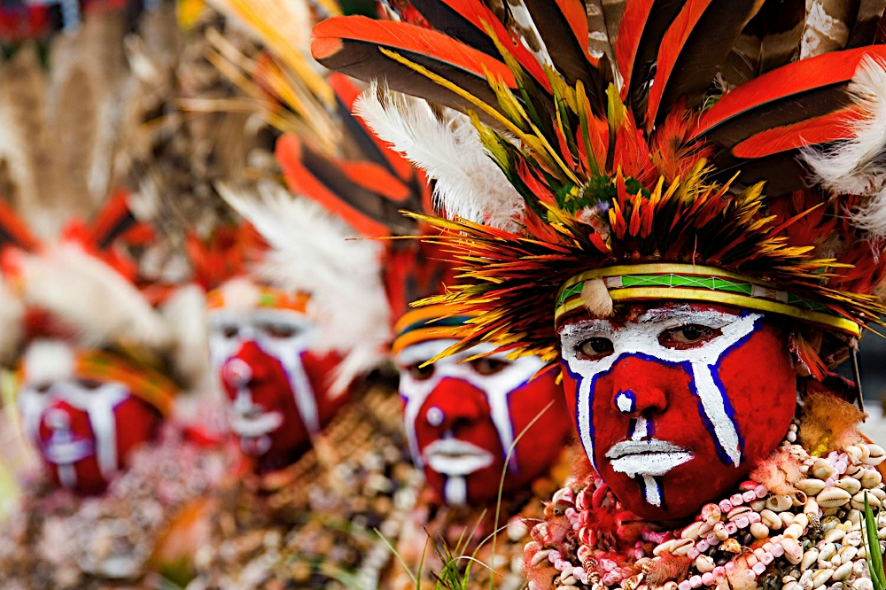 Festival Mount Hageb